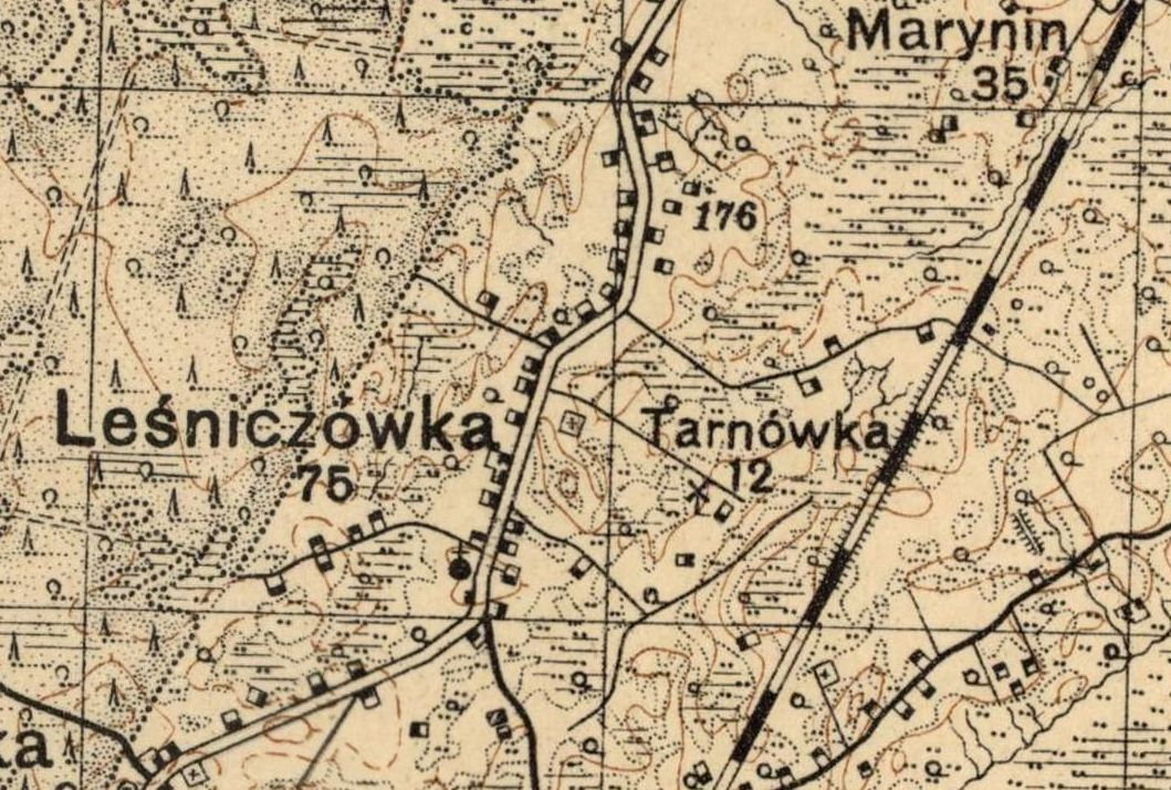 Leśniczówka (pow. chełmski) na mapie Wojskowego Instytutu Geograficznego z 1931 r.